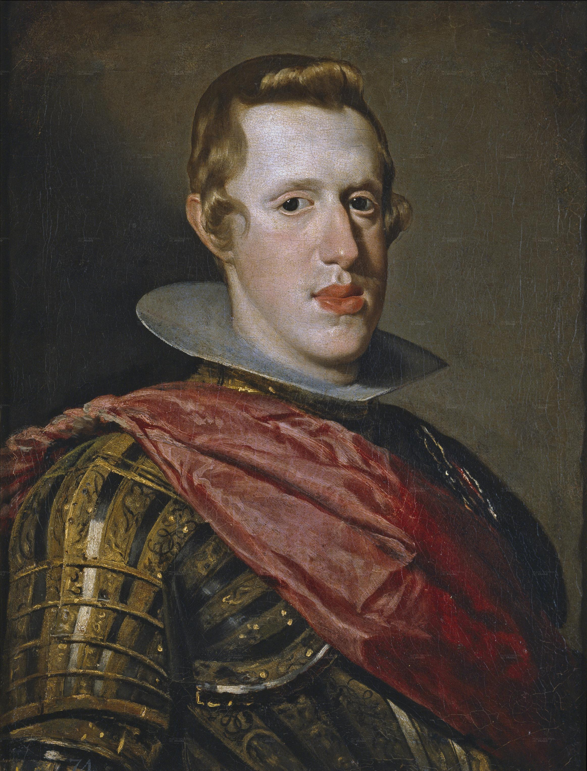 Retrato del rey Felipe IV de España (1601-1665), que fue hijo del rey Felipe III de España y de la reina Margarita de Austria.